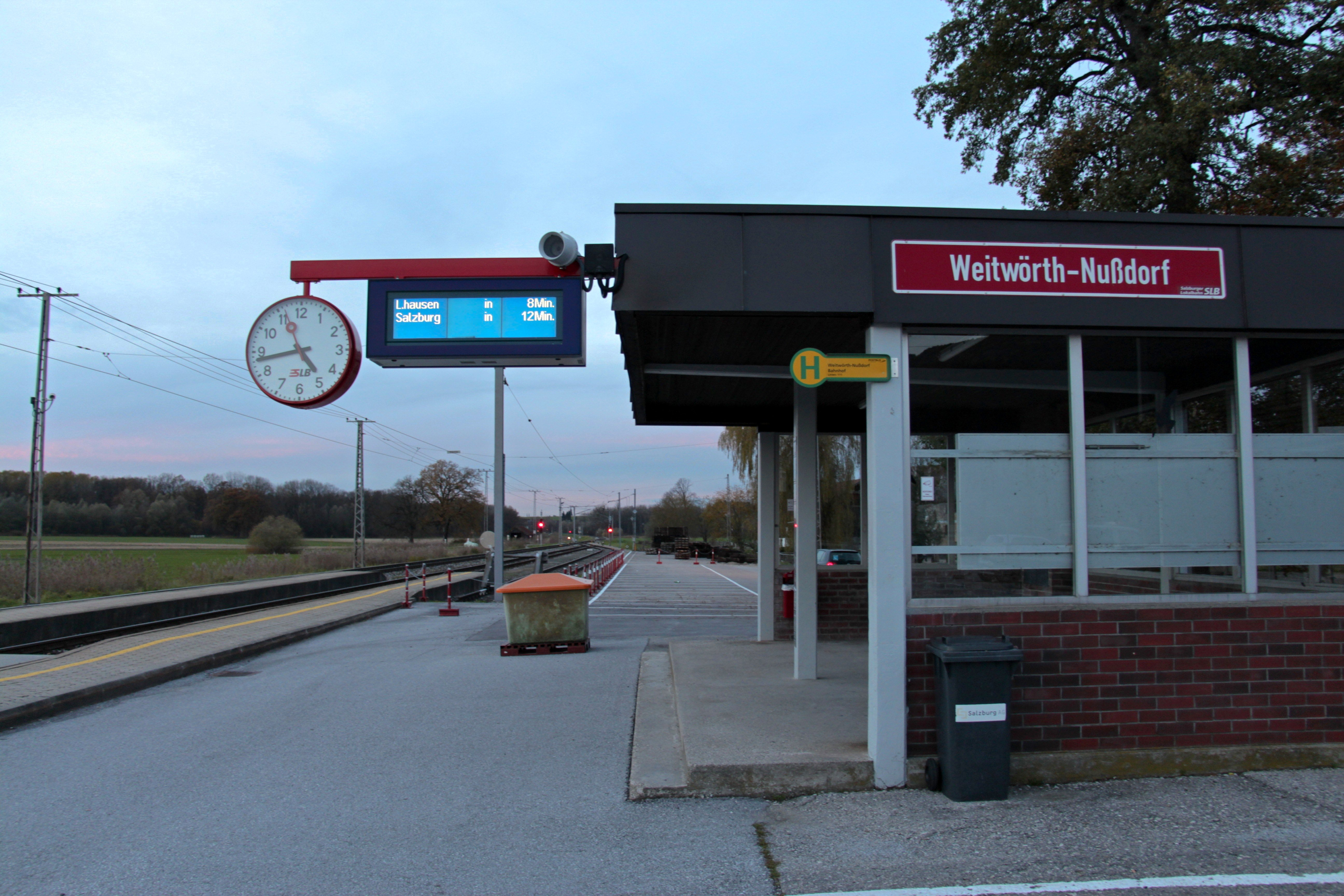 Haltestelle Weitwörth-Nußdorf der Salzburger Lokalbahn in Weitwörth, Gemeinde Nußdorf am Haunsberg im Norden des Bundeslandes Salzburg (Bezirk Salzburg-Umgebung). Dieser Bau war bis Mai 2016 in Betrieb.